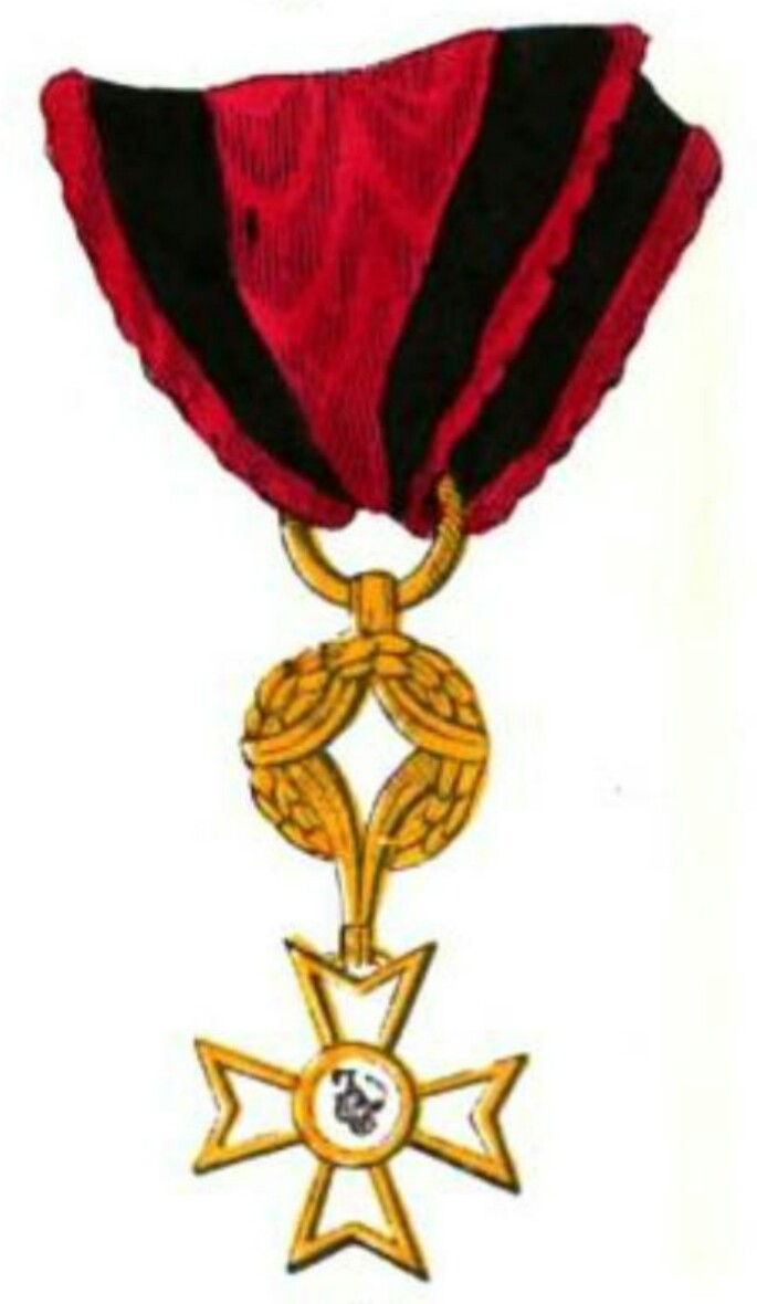 Order Moretta (Państwo Kościelne)